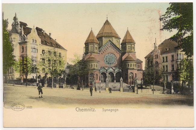 Die Synagoge am Stephanplatz auf dem Kaßberg, ehemals der Mittelpunkt des jüdischen Lebens in Chemnitz (Ansichtskarte, um 1900)